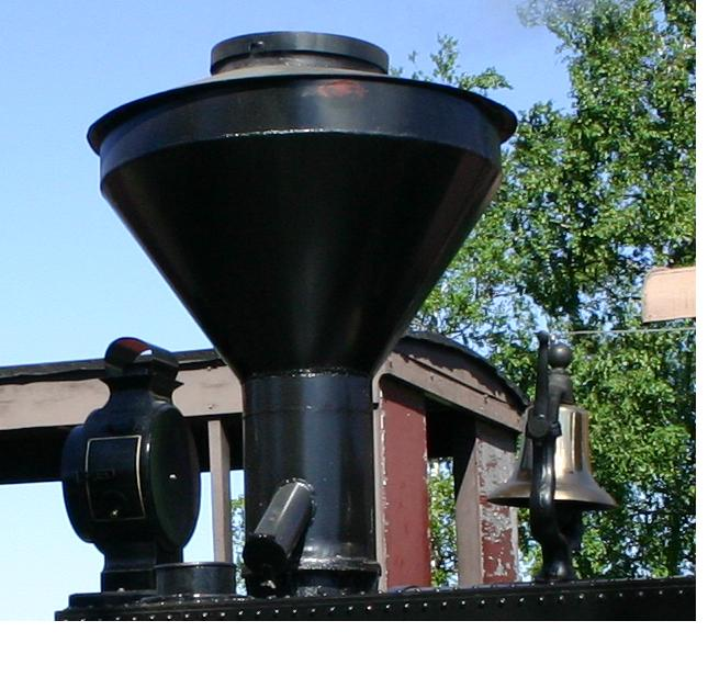 Porter-veturin halkoturbiini